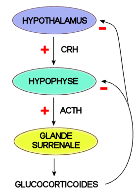 Schéma de régulation de l'hormone corticotrope